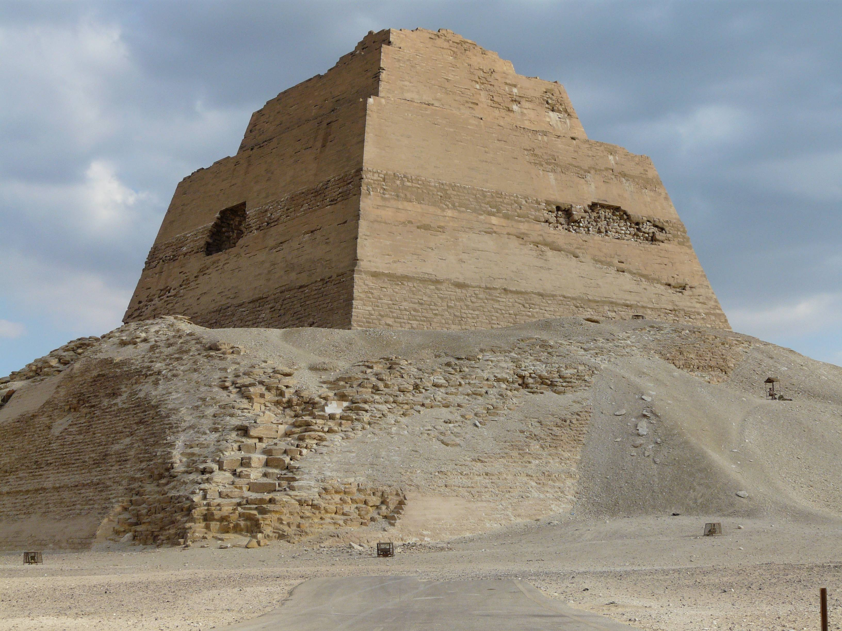 La pyramide de Meidoum